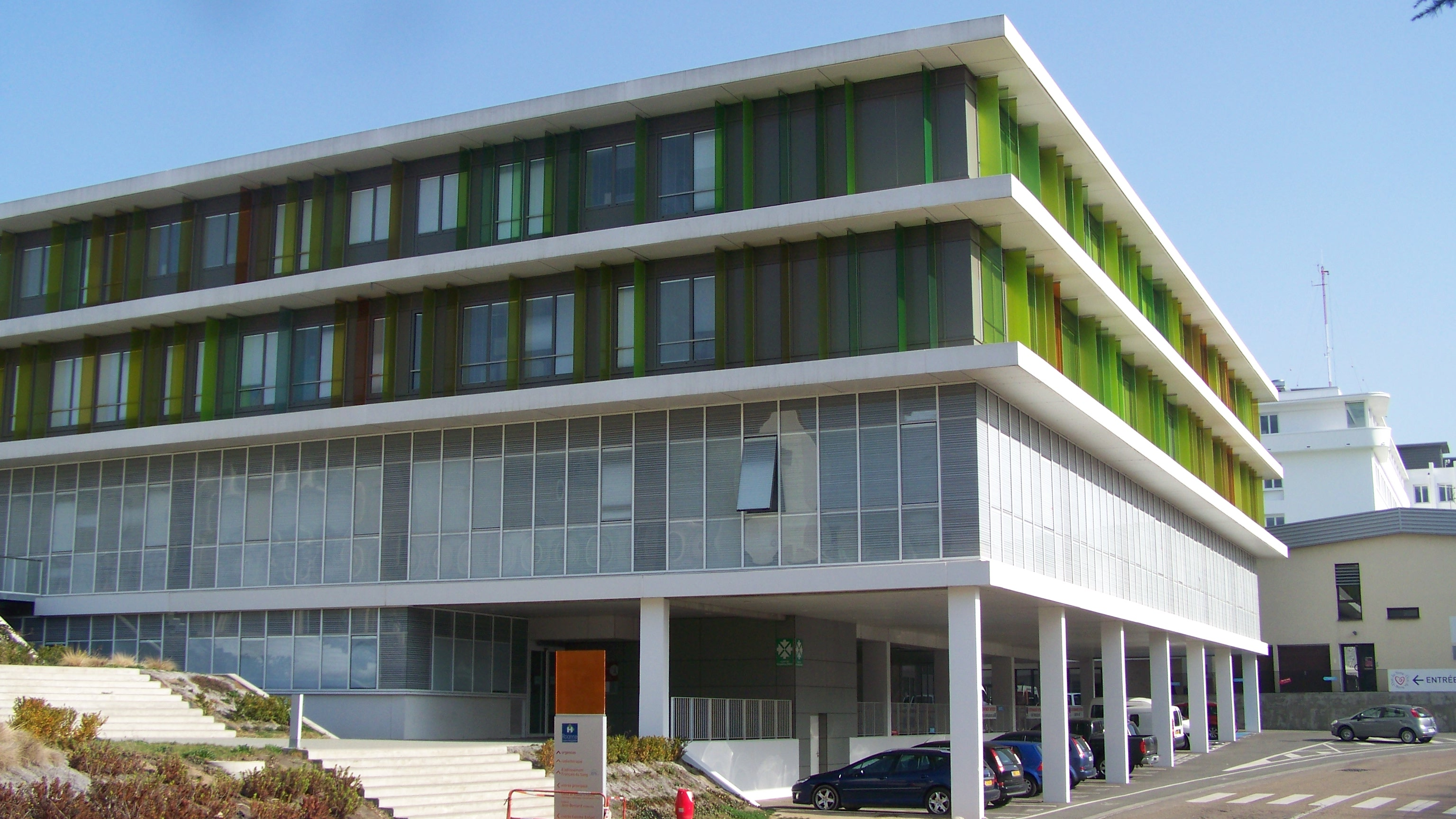 un bel ensemble architectural....